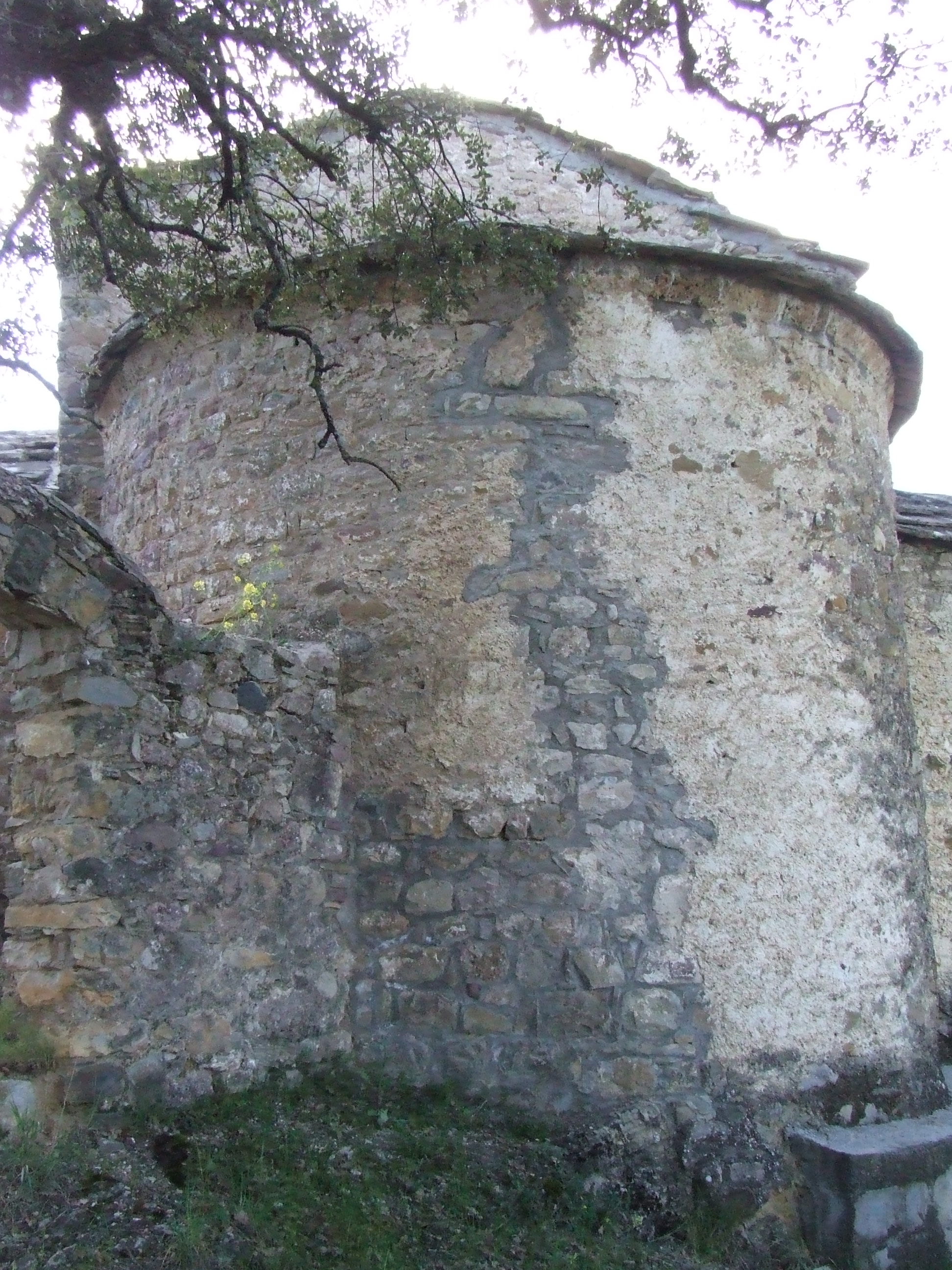 Absis de Santa Bàrbara de Sensui (Salàs de Pallars, Pallars Jussà)